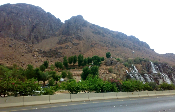 جانب من حديقة الشهداء بالمدينة المنورة